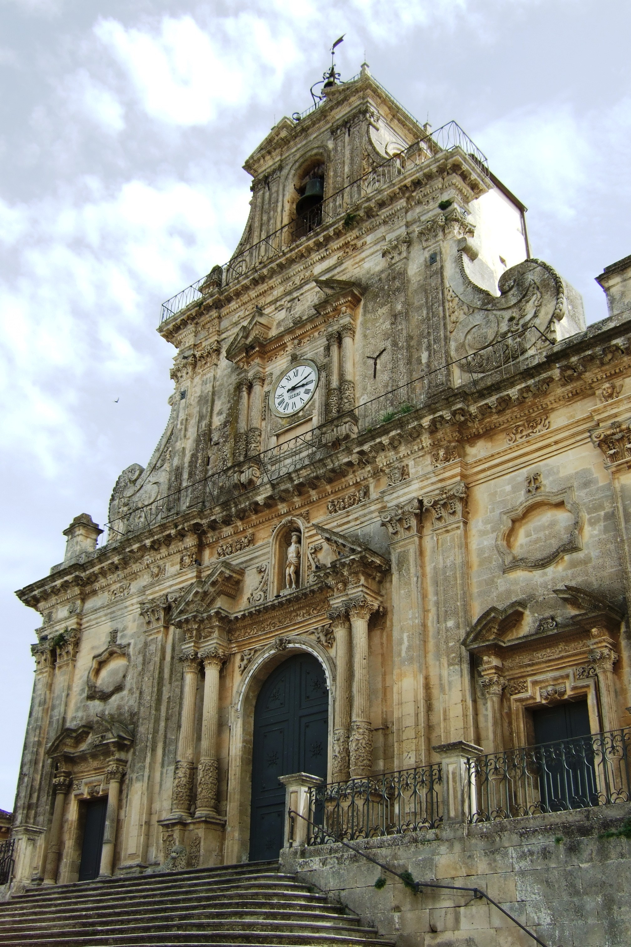 Facciata della Chiesa di San Sebastiano a Palazzolo Acreide (Siracusa)